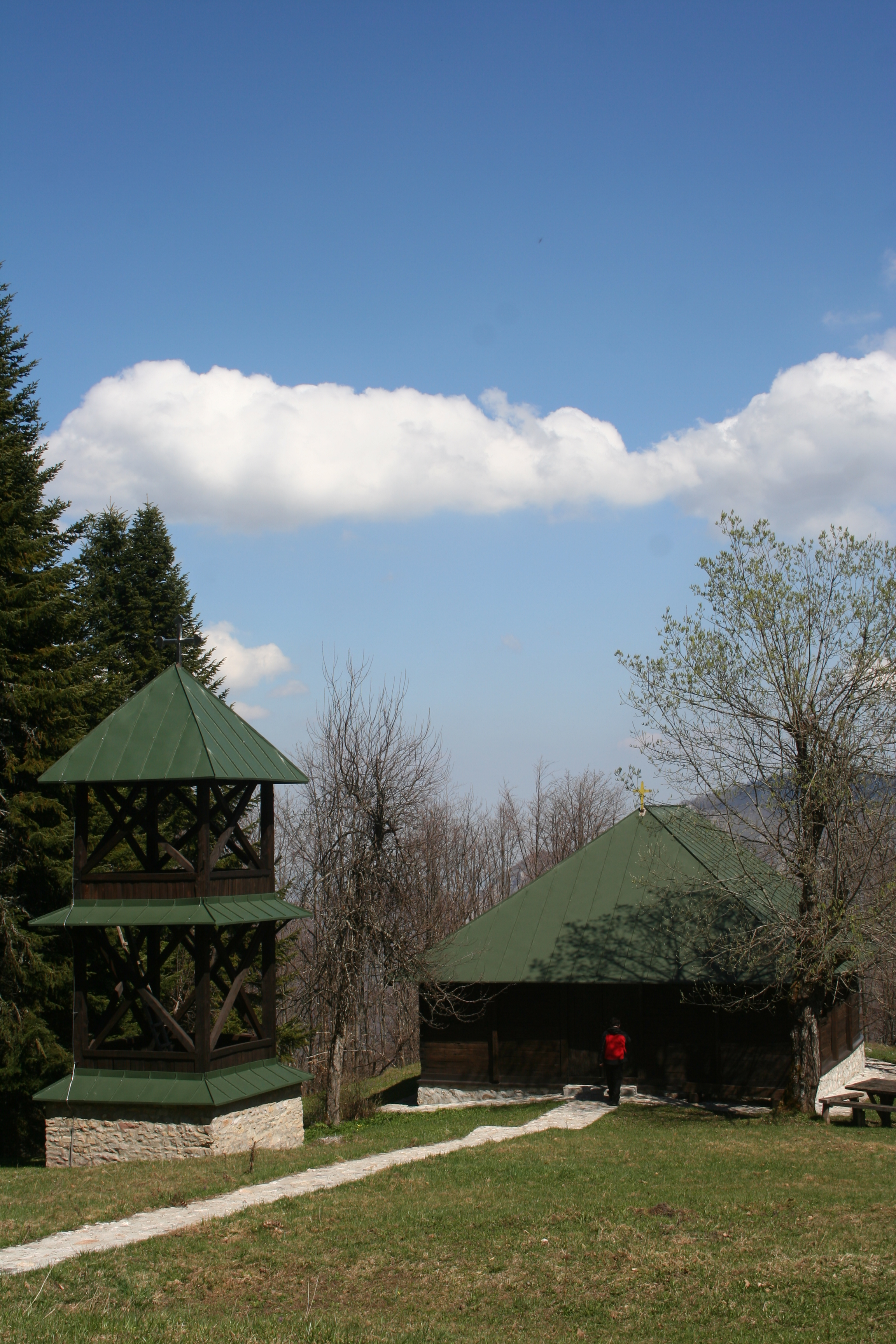 Crkva brvnara na Bobiji